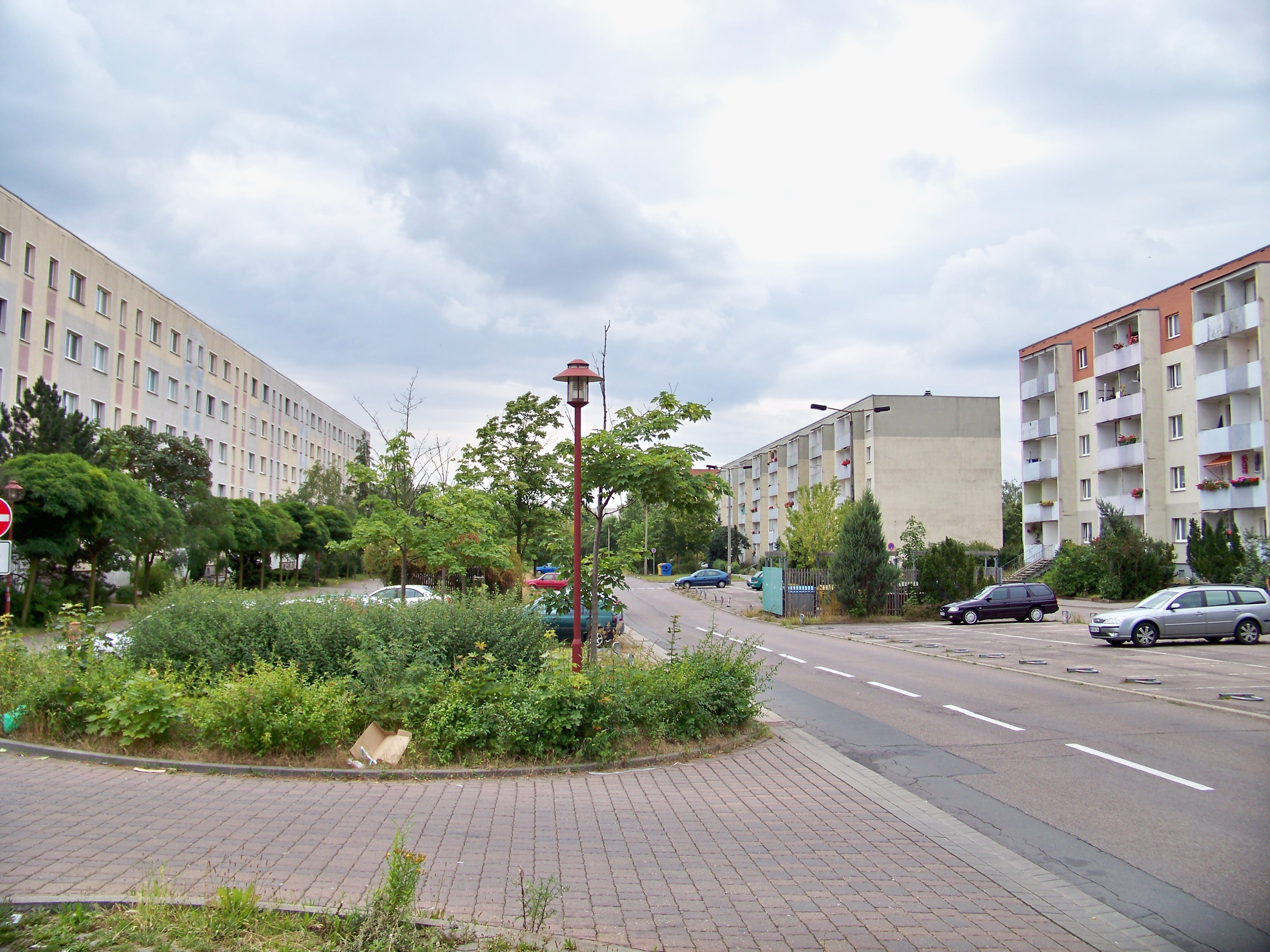 Ring der Bauarbeiter in Wolfen-Nord